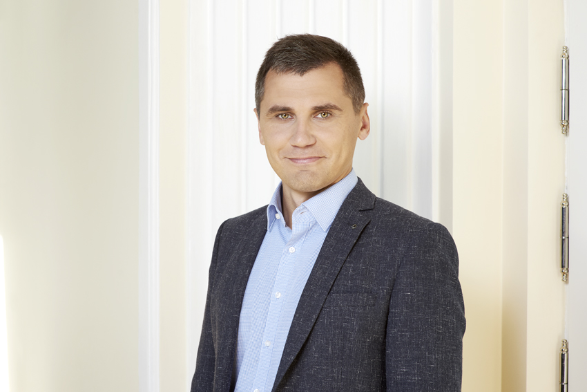 Meelis Kompus